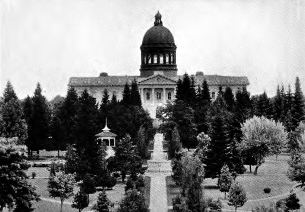 Old Oregon Capitol in Salem